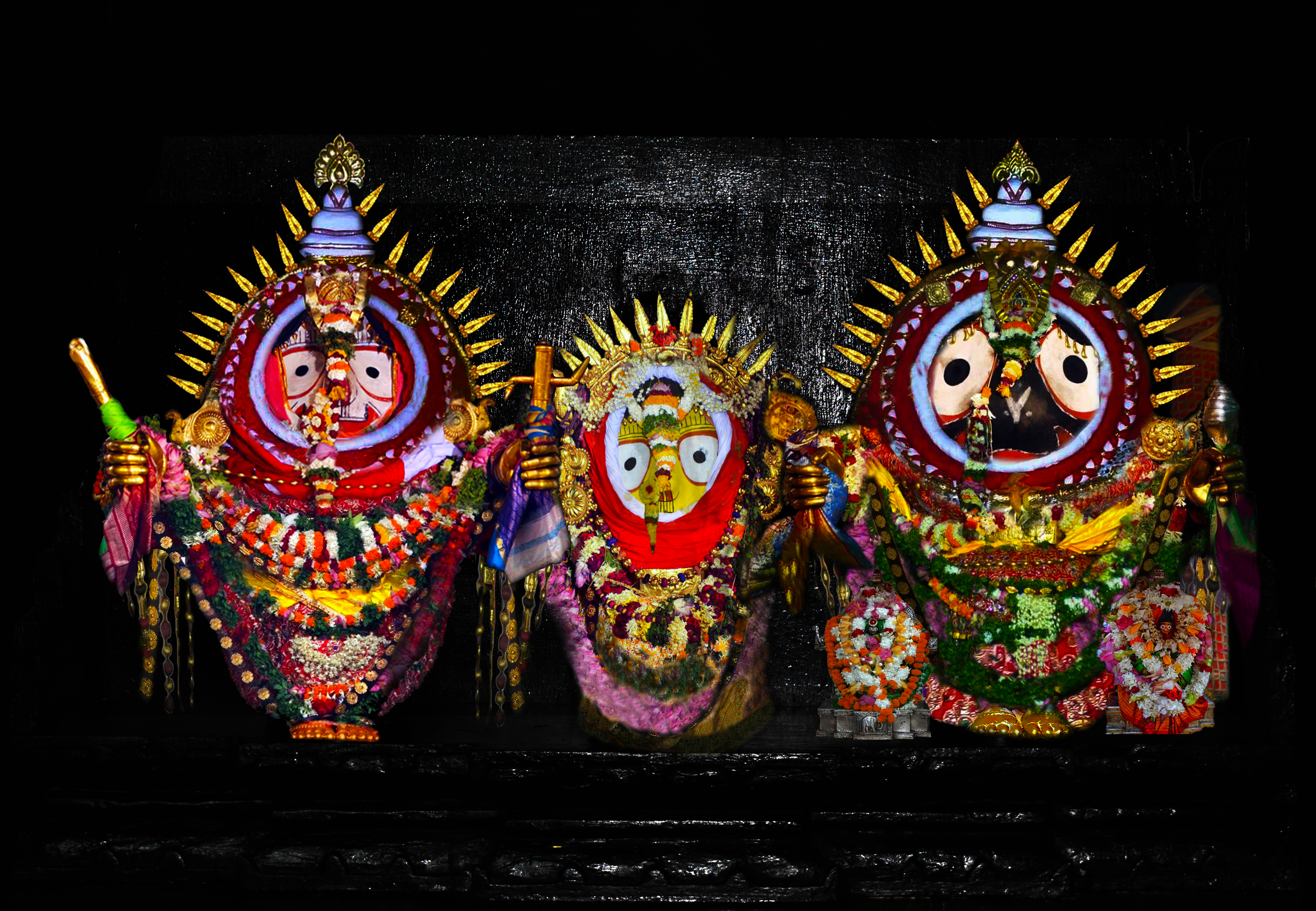 Lord Jagannath is adorned in Thiakia Besha on Kartika Sukla pakhya Ekadashi tithi .